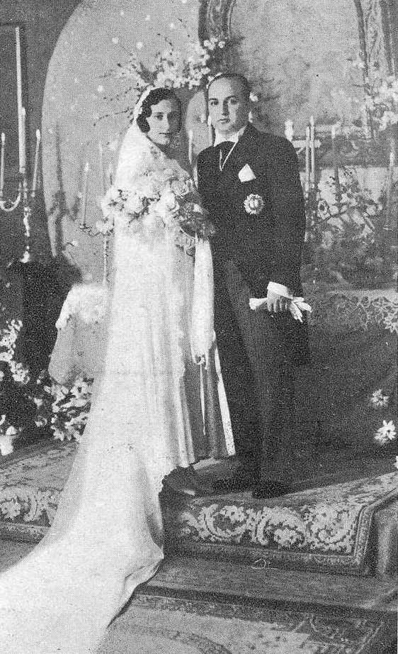 Voda de Ramón Rivero de Aguilar e María Díaz de Rábago, fotografía en Vida Gallega 1931